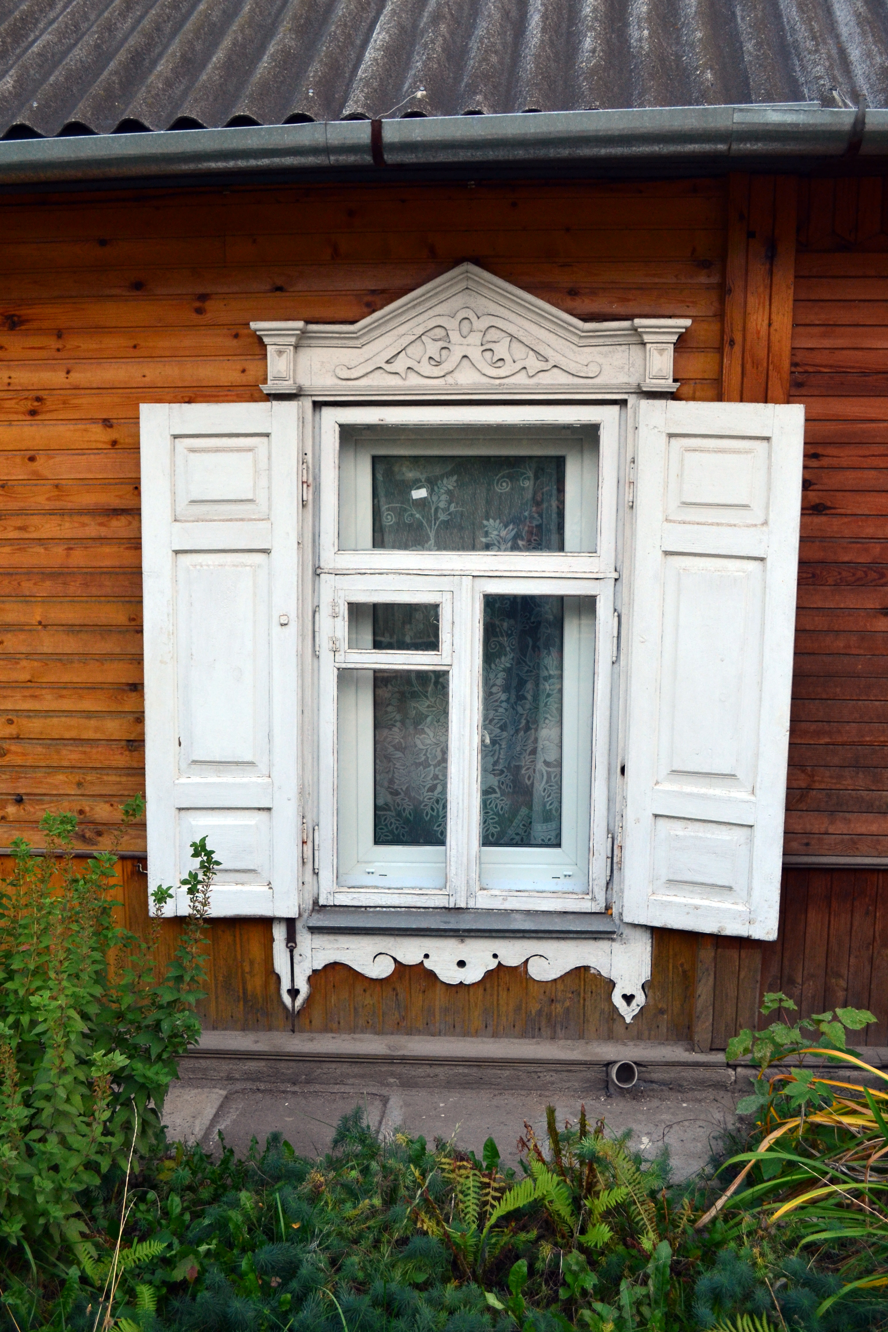 Беларуская (тарашкевіца): Комплекс драўлянай забудовы па зав. Паўночным, м. Менск. This is a photo of Belarusian heritage monument. Reference number: 713Г000212 ( WLM)